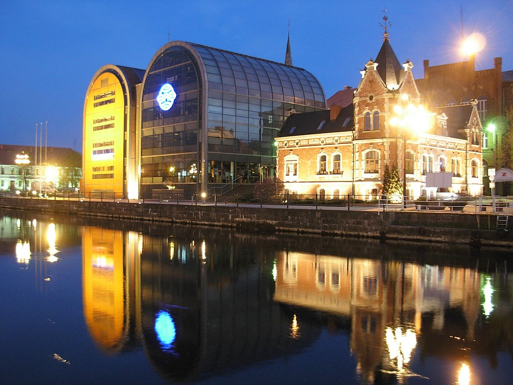 Pałacyk LLoyda i Nowe Spichrze w Bydgoszczy - panorama od strony Brdy